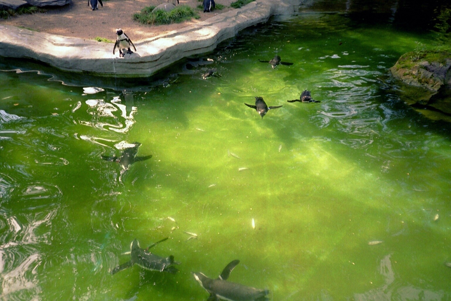 Brillenpinguine im Zoo Leipzig.